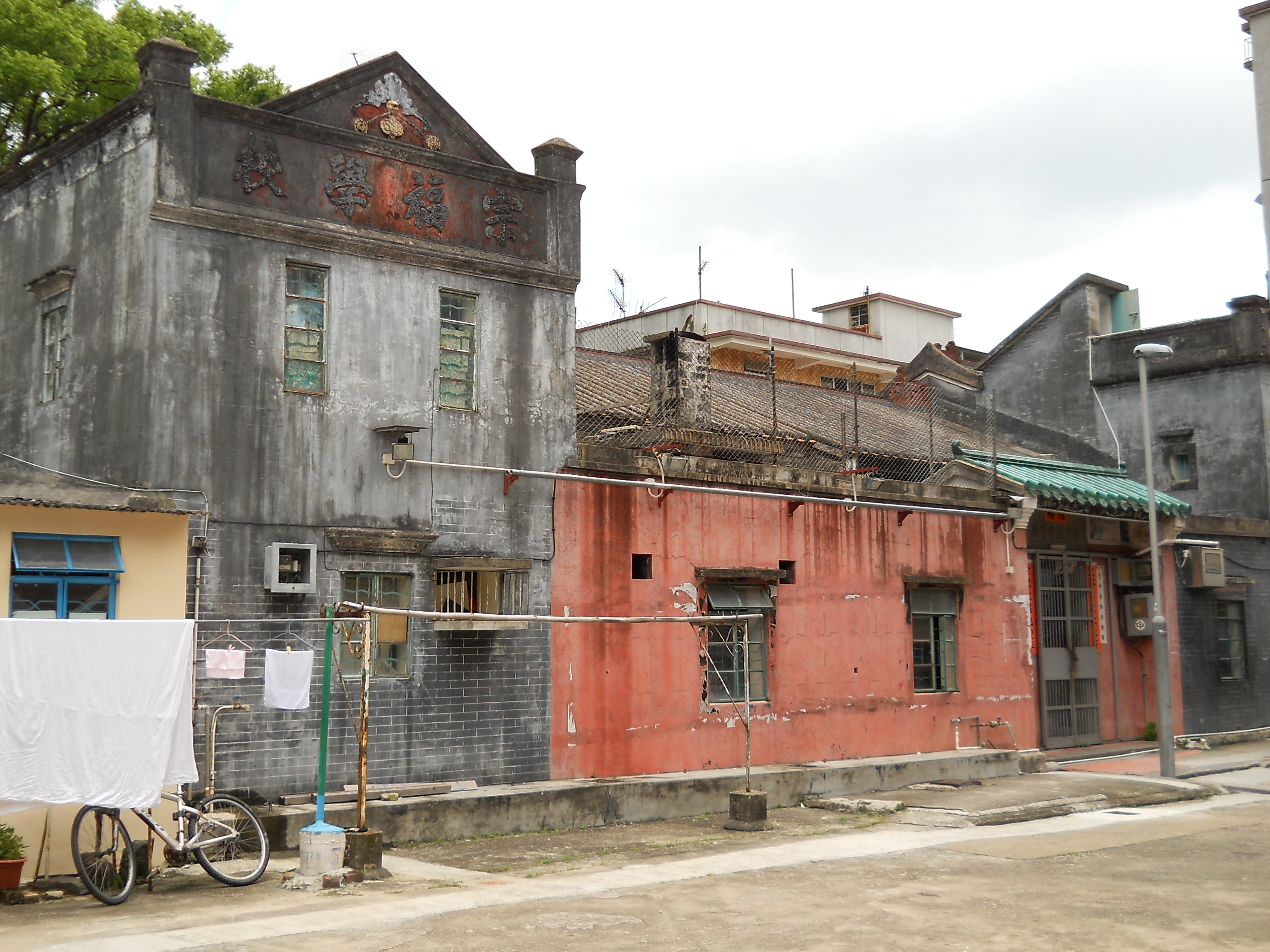 中文（香港）: 上水金錢侯宗福堂神廳